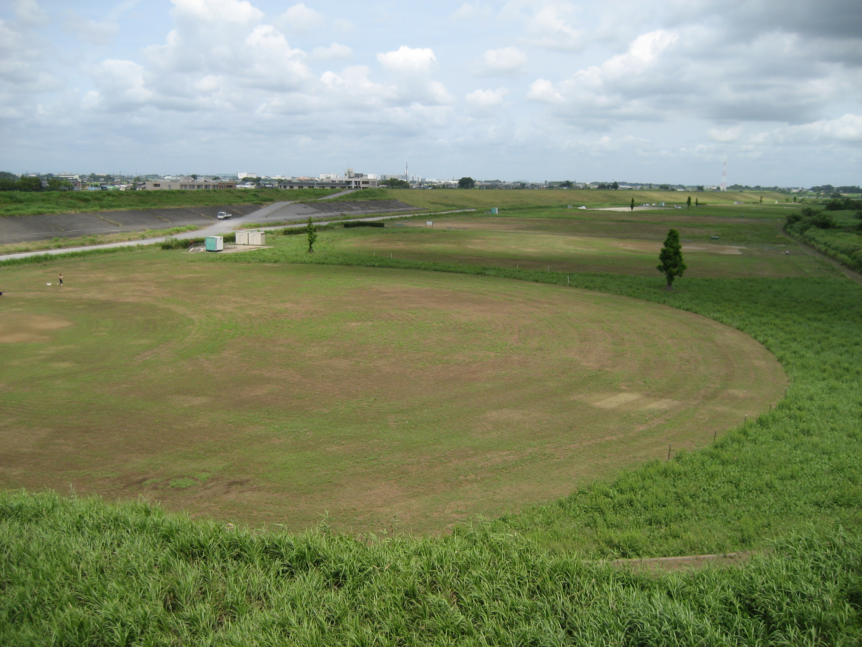 吉川公園玉葉橋北側エリアを撮影